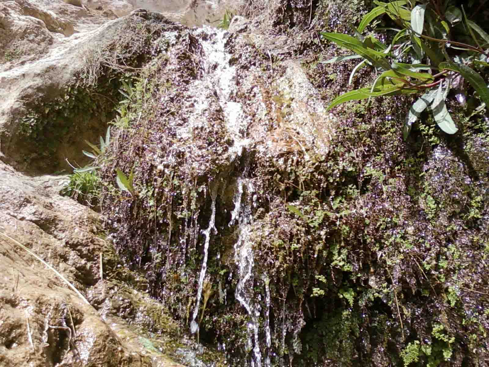 منطقه تفریحی رحمت آباد جویم